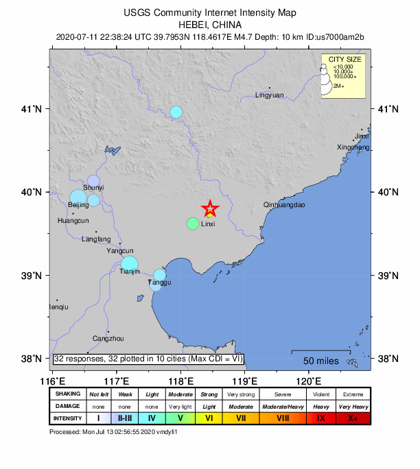 中文（中国大陆）: 2020年7月12日USGS的唐山地震烈度图